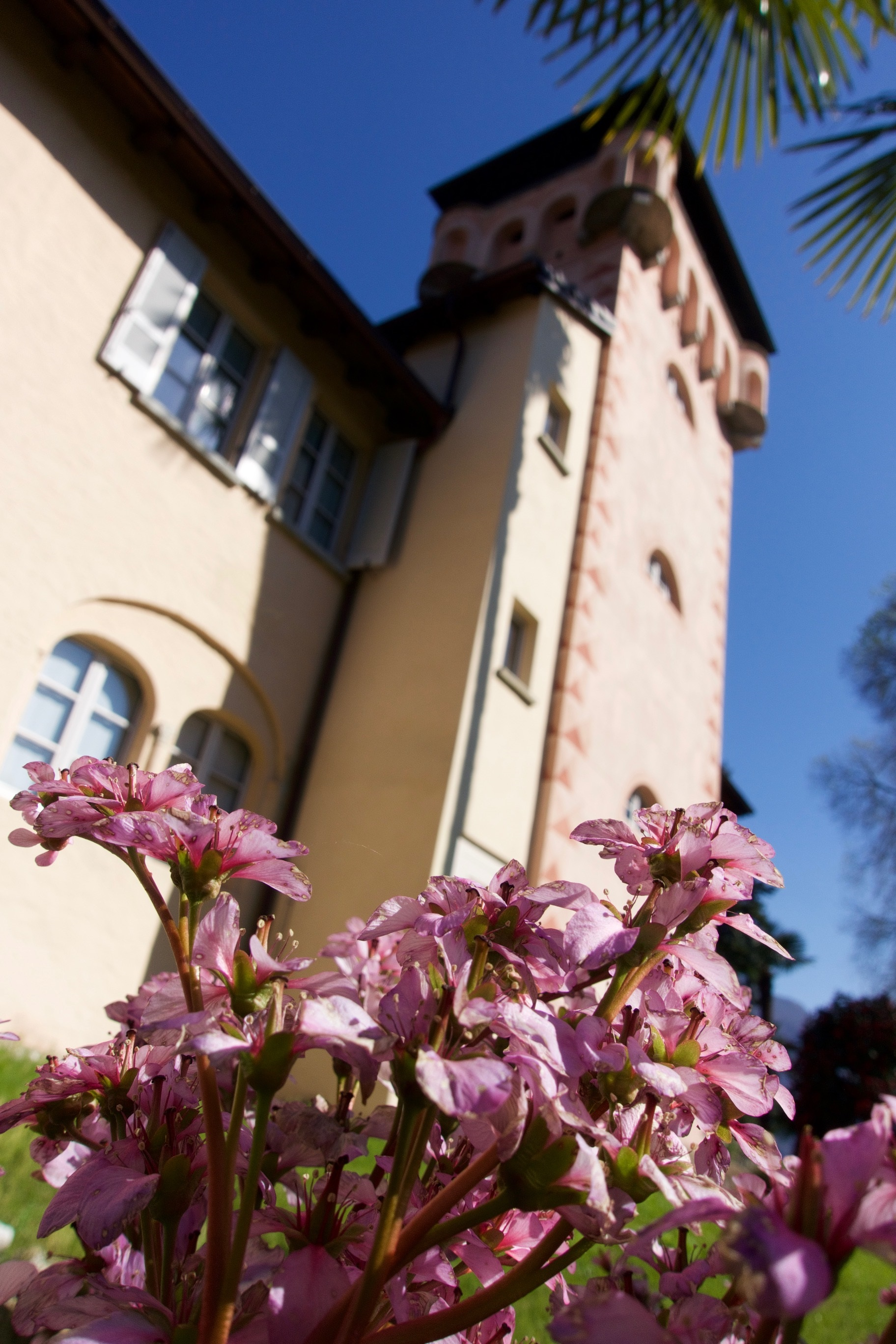 Ascona Museo Castello San Materno - Fondazione per la cultura Kurt e Barbara Alten